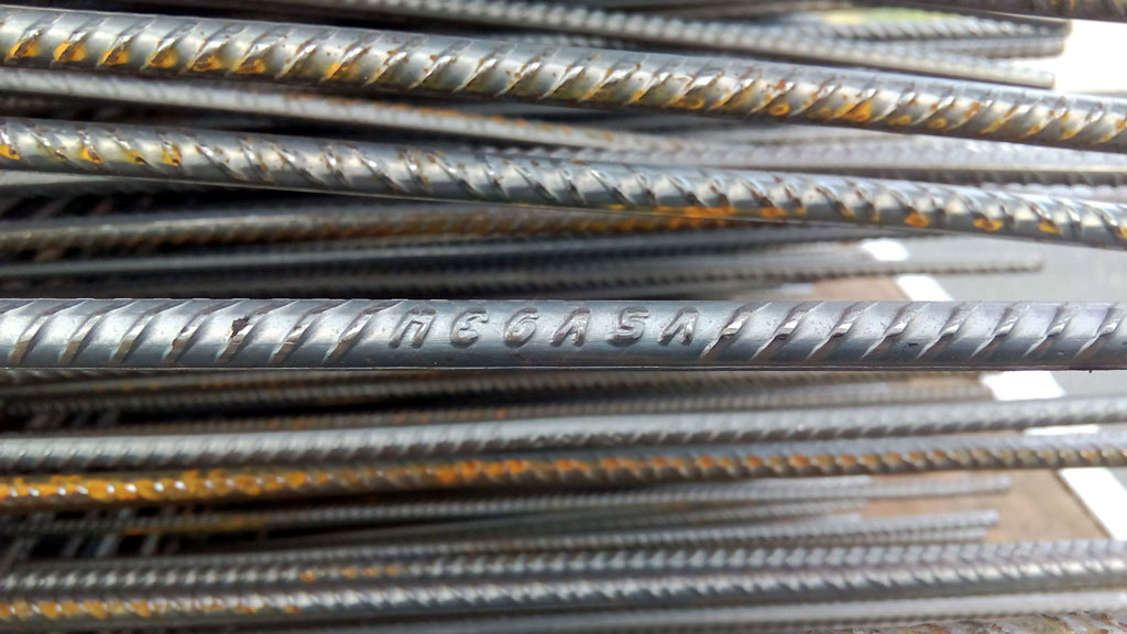 Aceiro de Megasa.